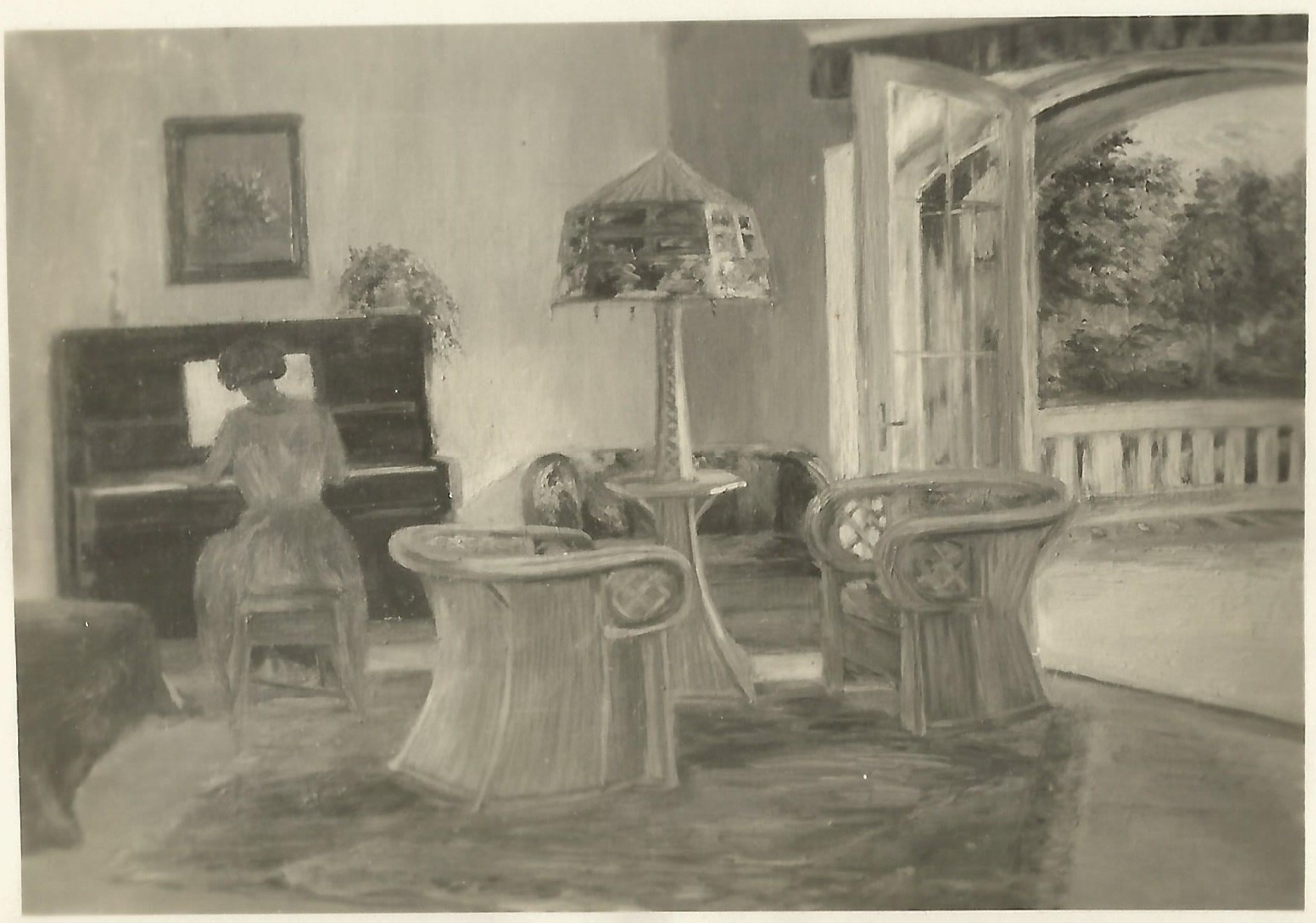 Kovács Jenő Józsefné Boldogfai Farkas Klára festőművész festménye: Farkas Zsuzsa, a húga zongorázik a balatonlellei villájában